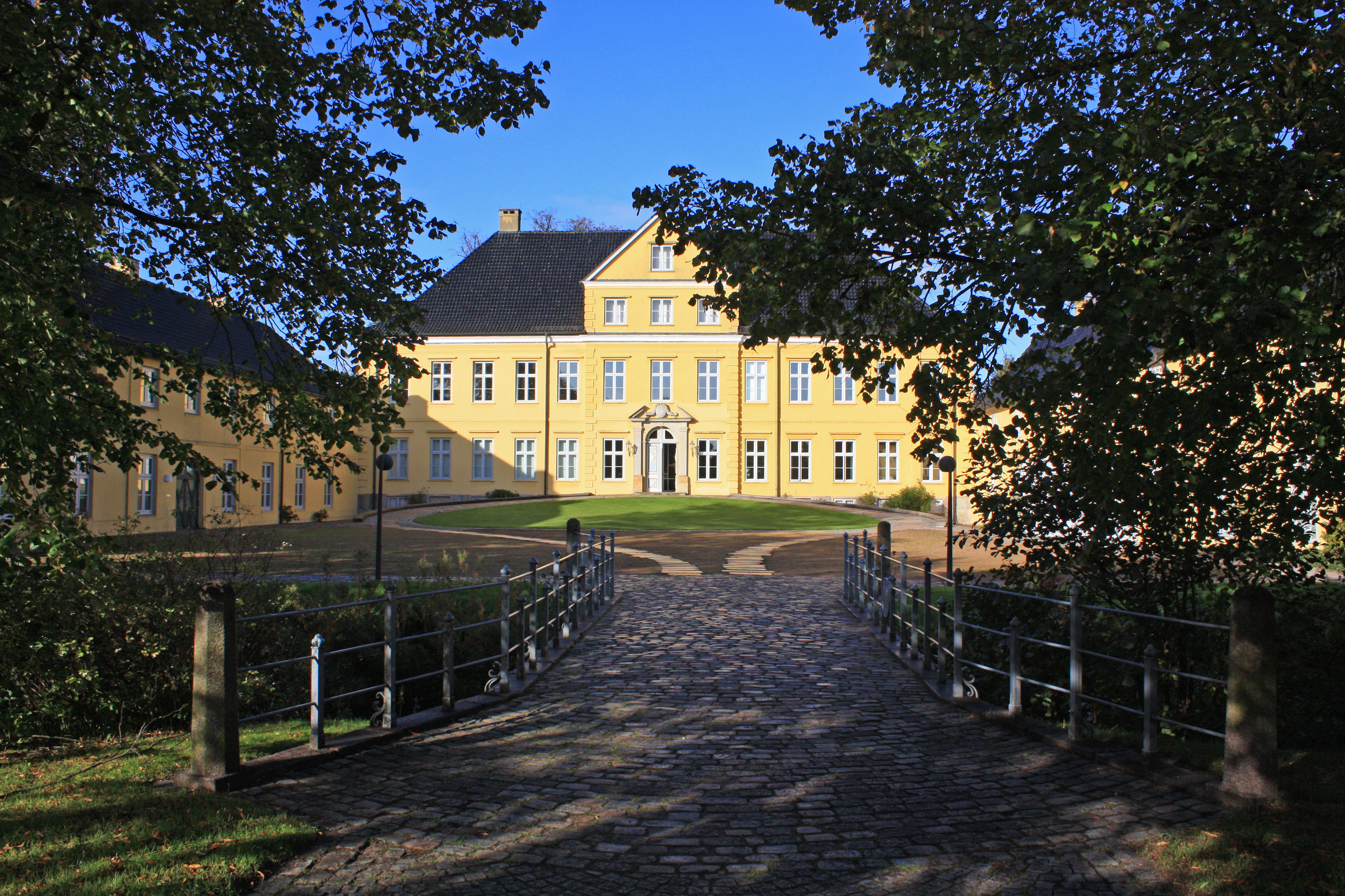 Prinzenpalais. Gottorfstraße 6, Friedrichsberg (Schleswig). No 106